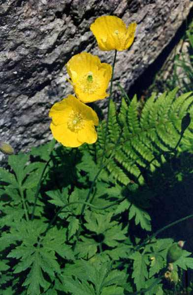 Meconopsis cambrica